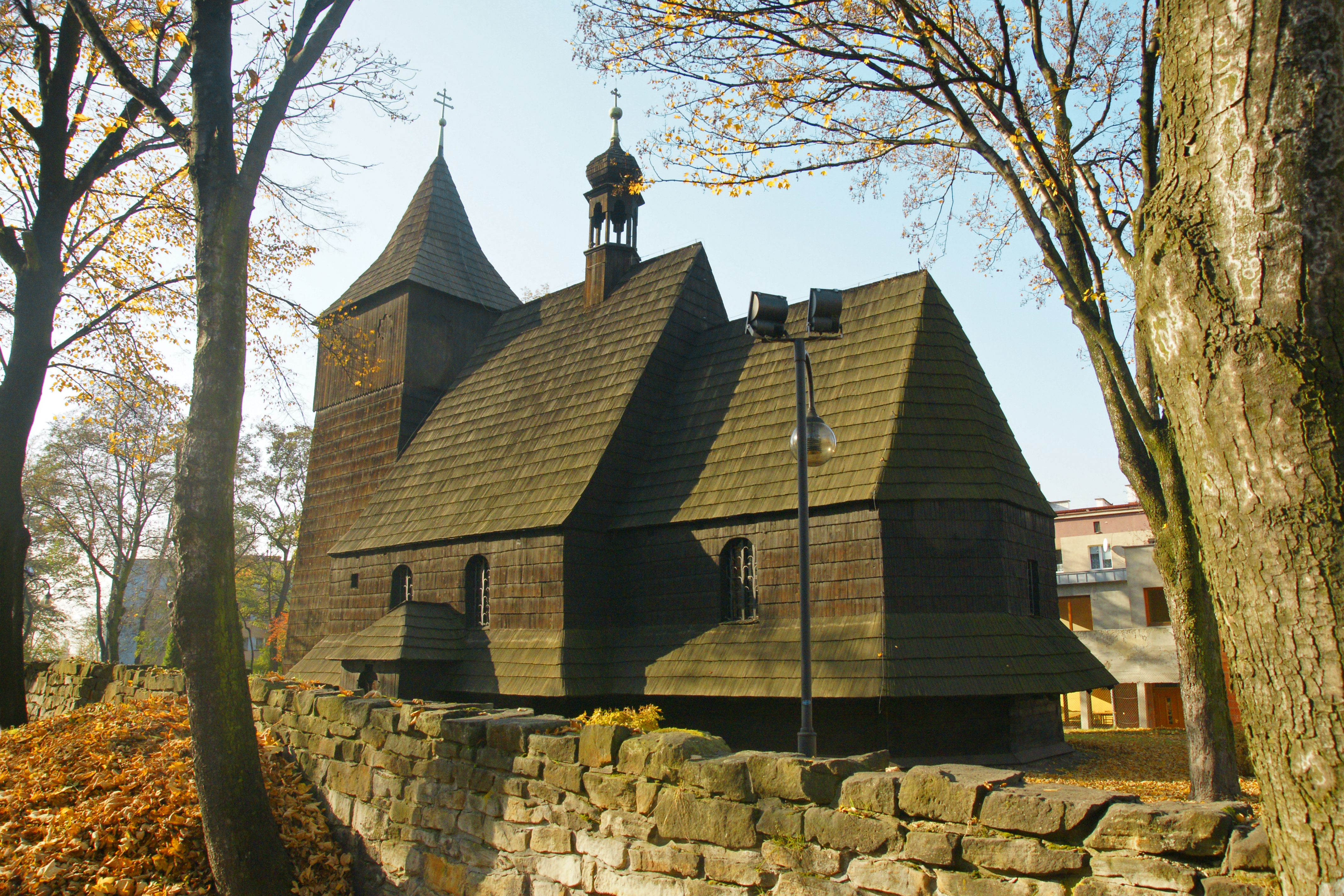 Kościół Św. Wawrzyńca Chorzów